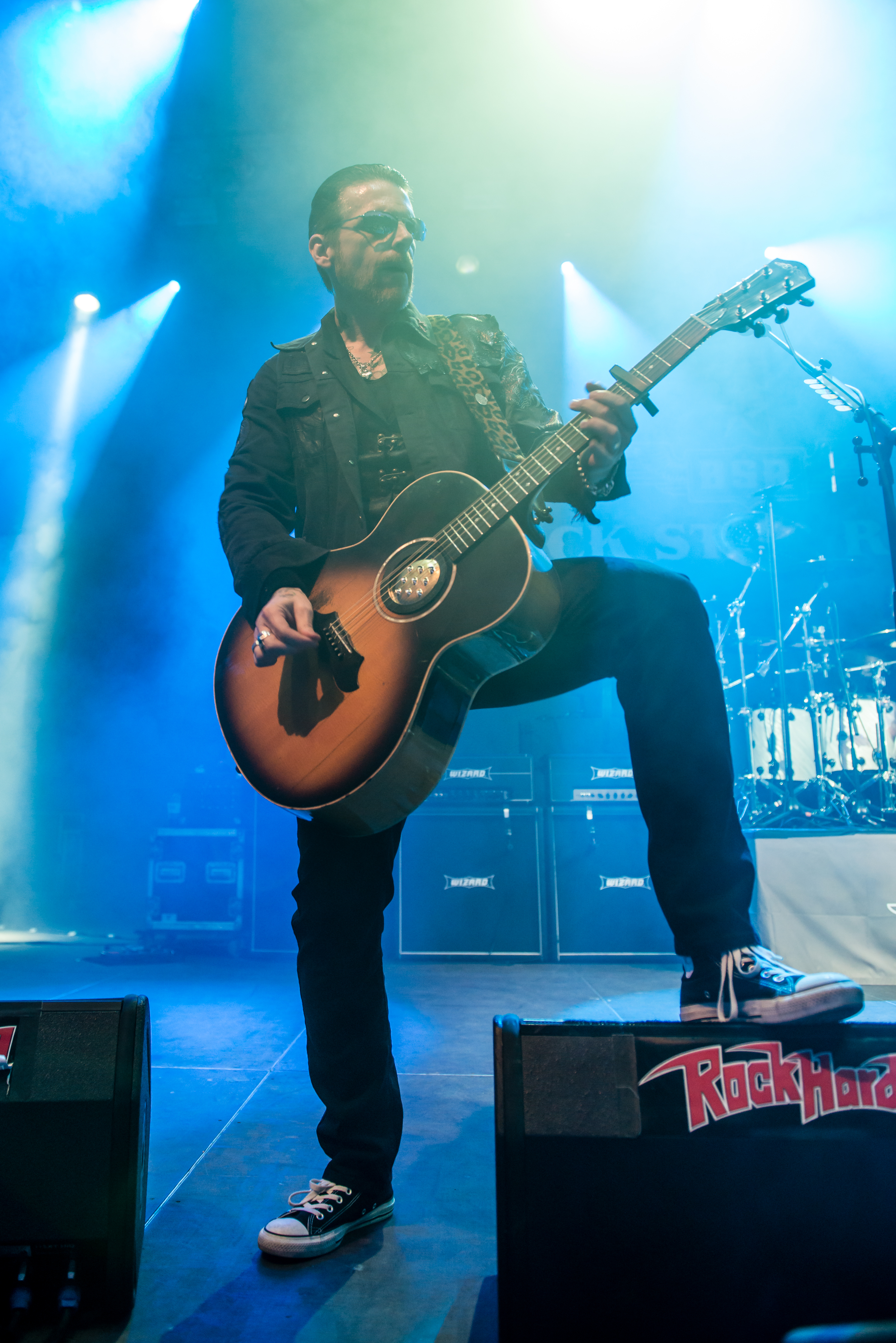 'Rock Hard Festival 2015; Gelsenkirchen Amphitheater': 'Black Star Riders'